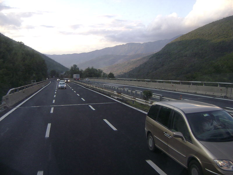 Dálnice A16 v Baianu, Itálie